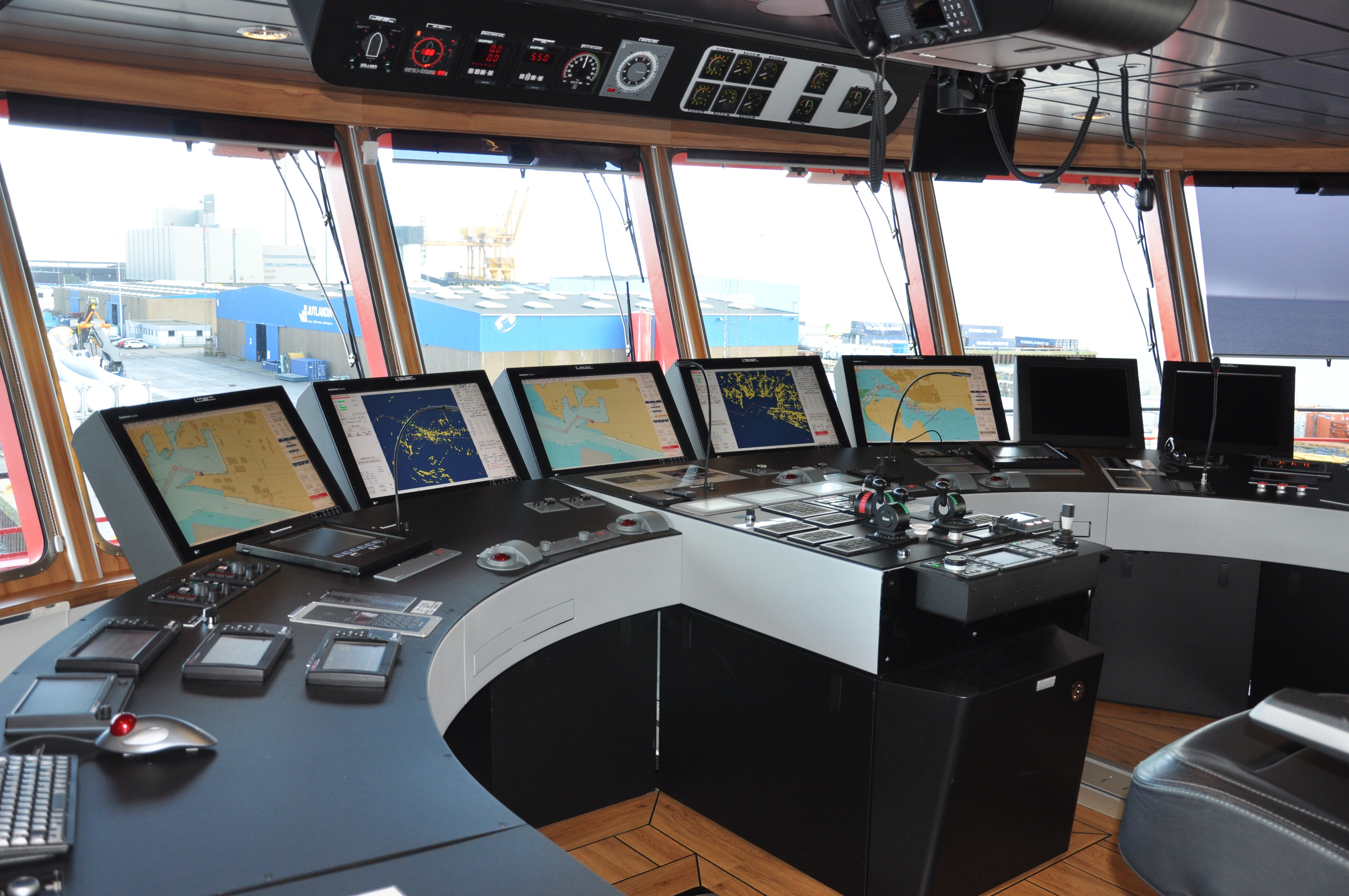 Integriertes Brückensystem von Raytheon Anschütz, installiert auf einem Windpark Service Schiff.